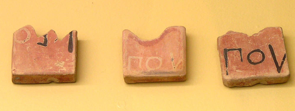 Jetons de terre cuite utilisés probablement comme pièces d'identité ou jetons de tirage au sort pour des magistratures civiques. Vers 450-425 a. C. Musée de l'Agora antique d'Athènes.